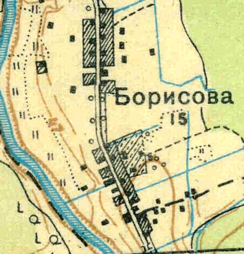 Топографическая карта Ленинградской области, квадрат О-36-25-Б-б (Бол. Слудицы), деревня Борисово